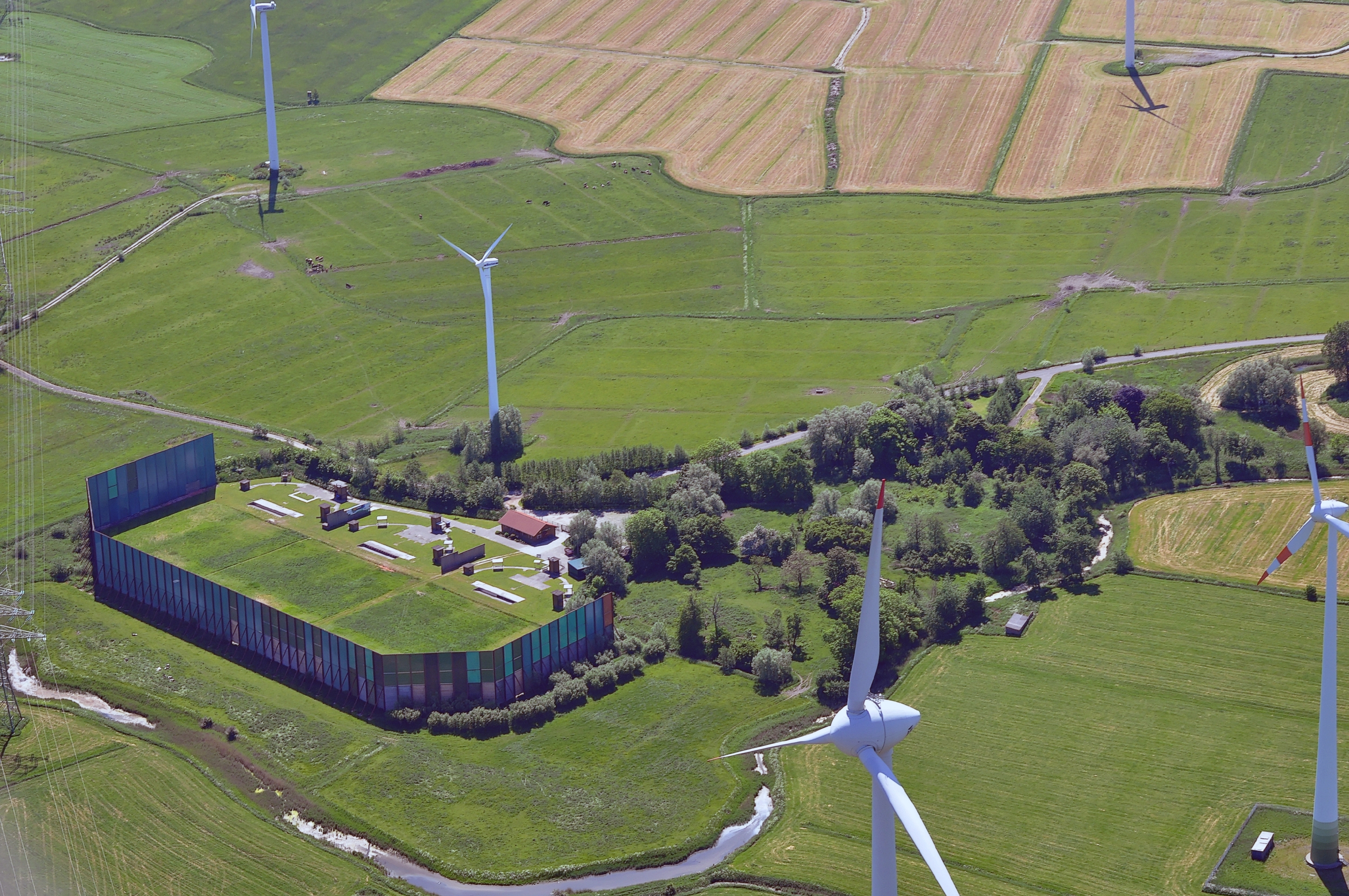 Luftbilder von der Nordseeküste 2012-05